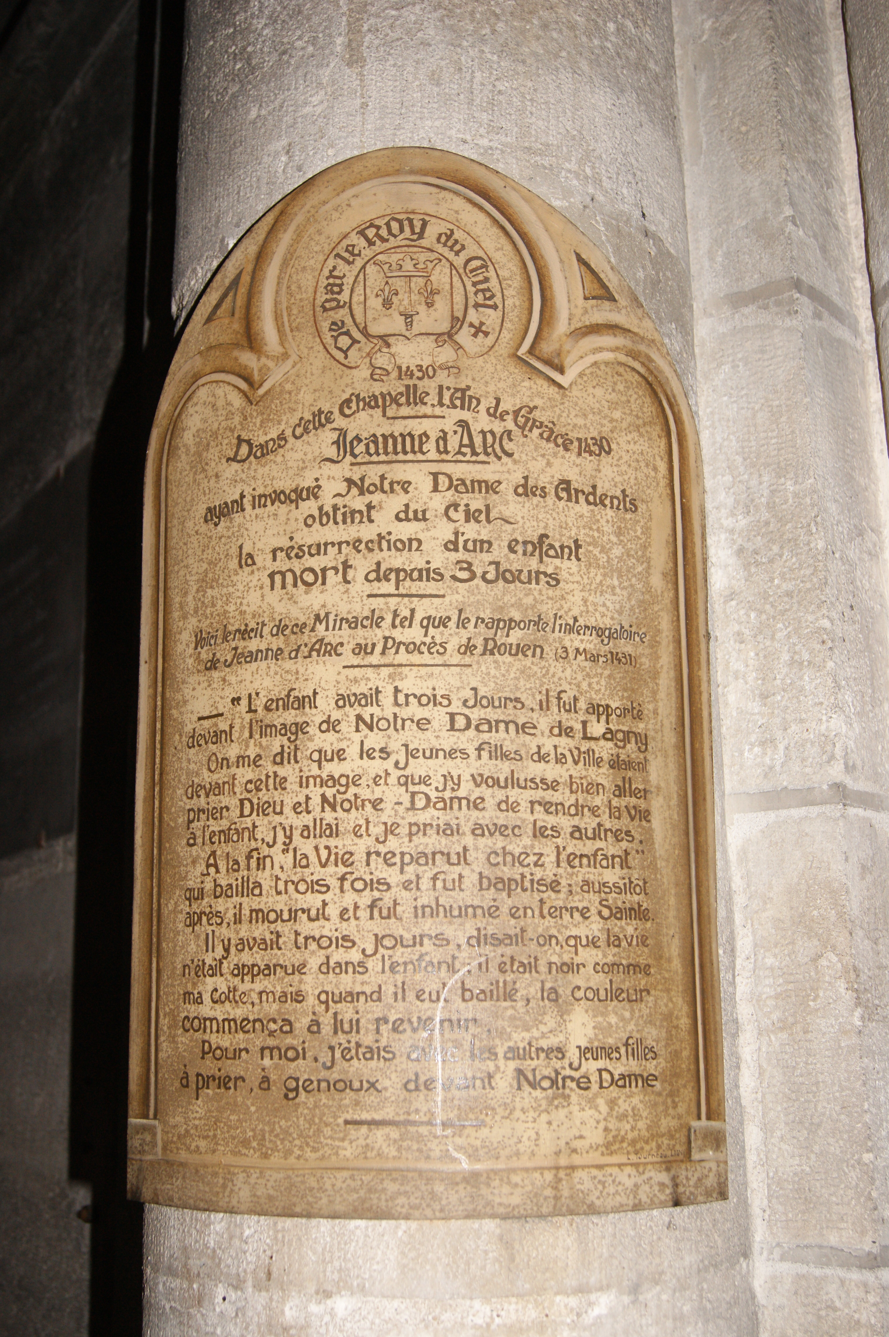 Procès de 1430 - Chapelle de la Sainte Vierge